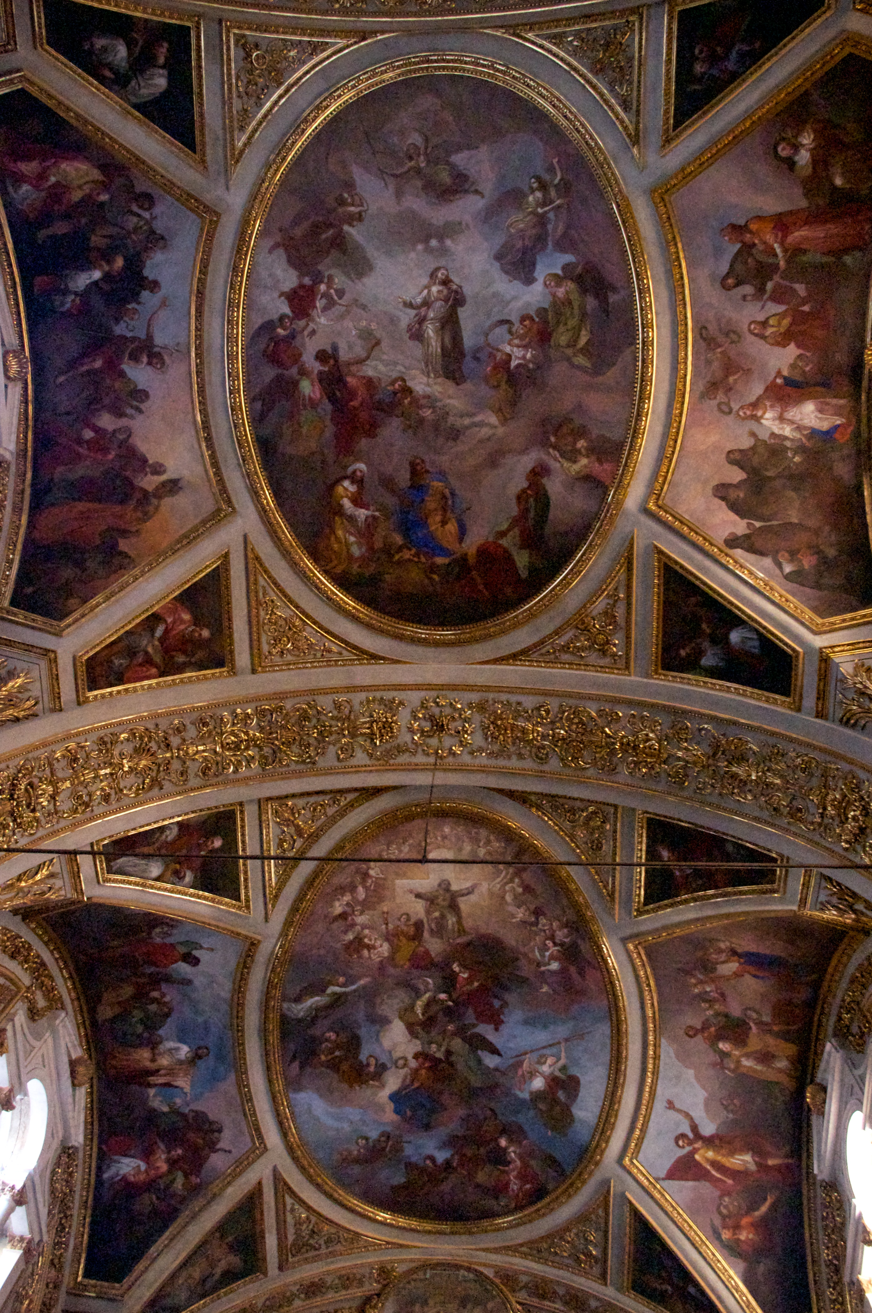 Eglise de Saints Martyrs - Turin